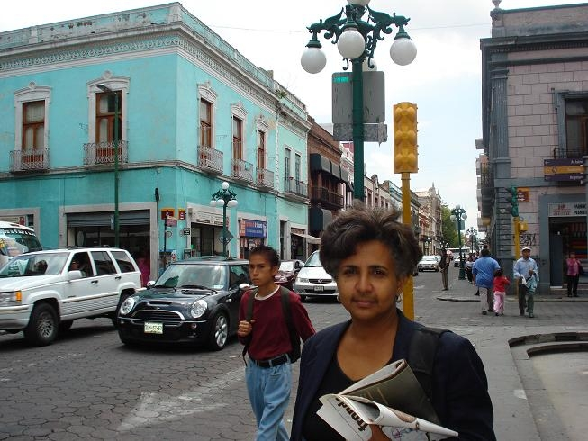 La escritora cubana Caridad Atencio